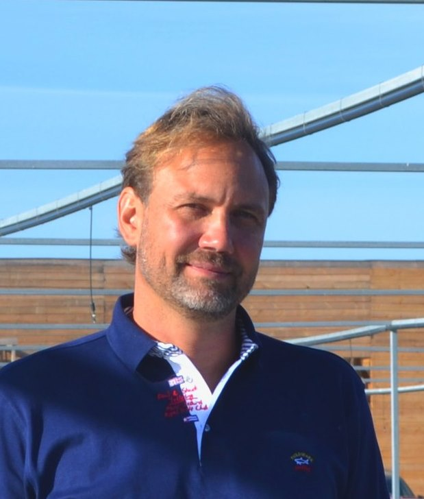 Разумовский Владимир Николаевич